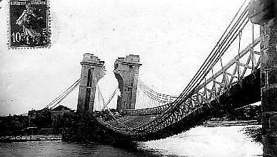 pont de Balbigny entrain de tomber